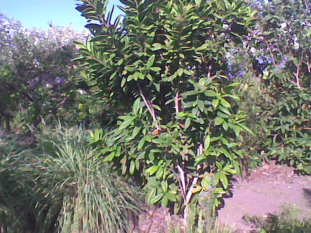 Sent bon lorsque l'on met dans du carry